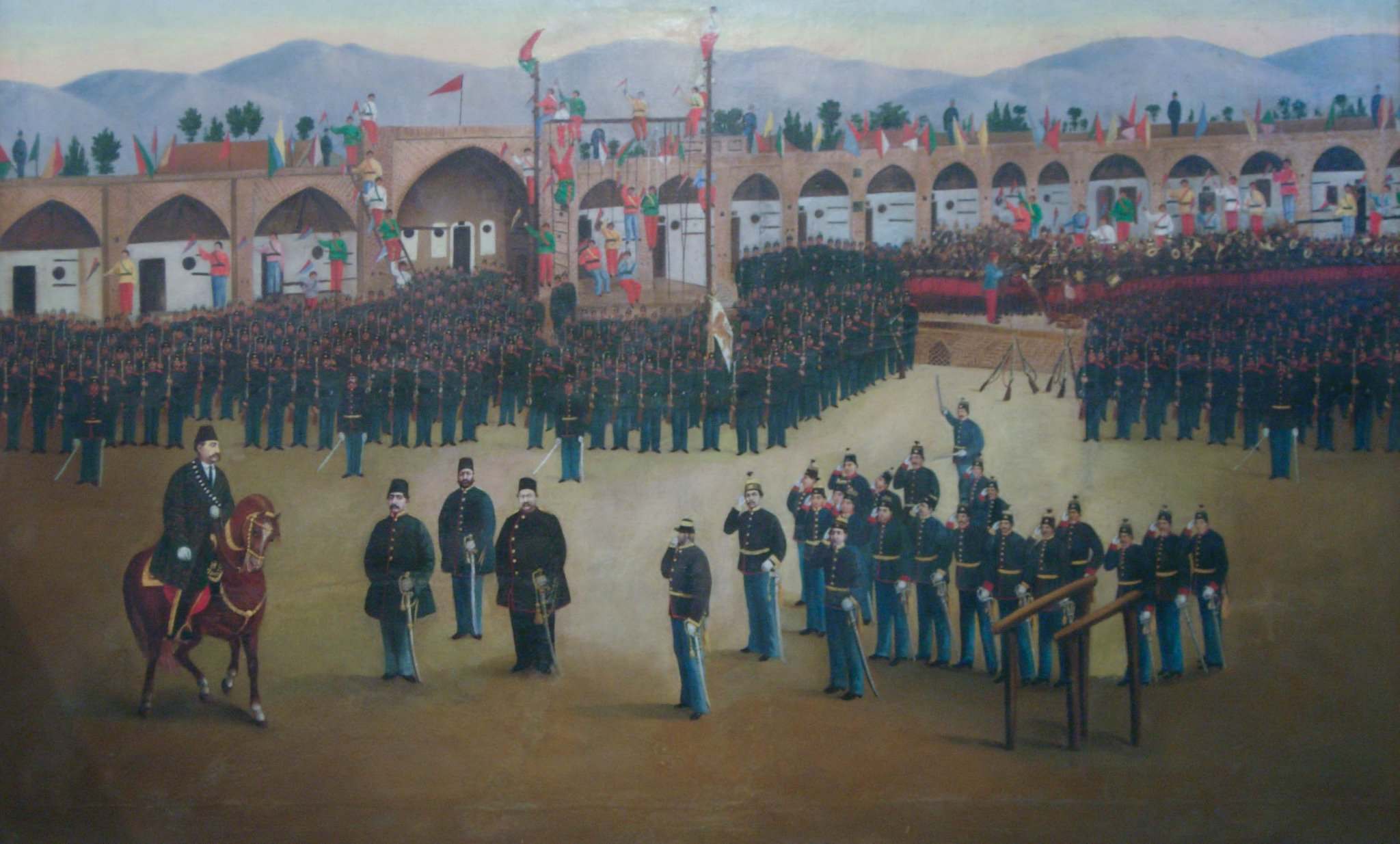 33171-Tehran